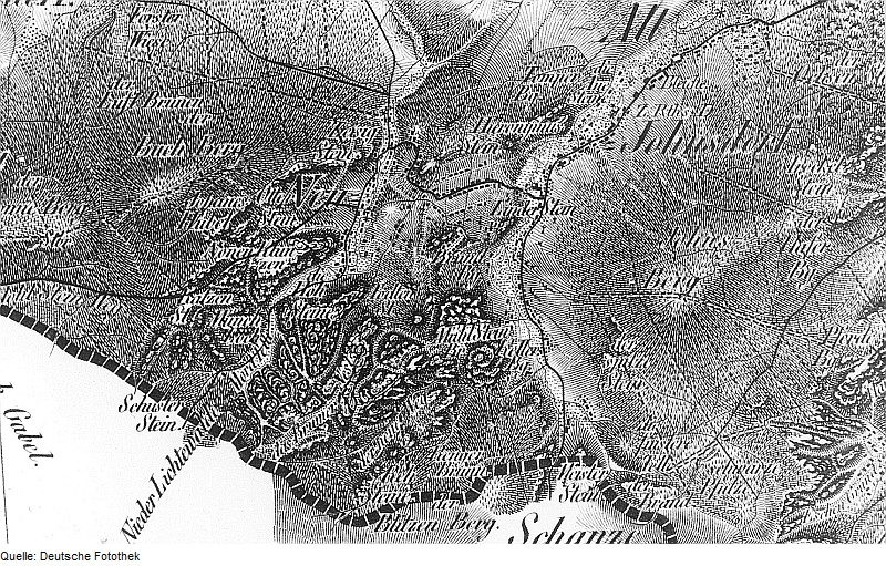 Original image description from the Deutsche FotothekJonsdorf. Oberreit, Sect. Zittau, 1844/46